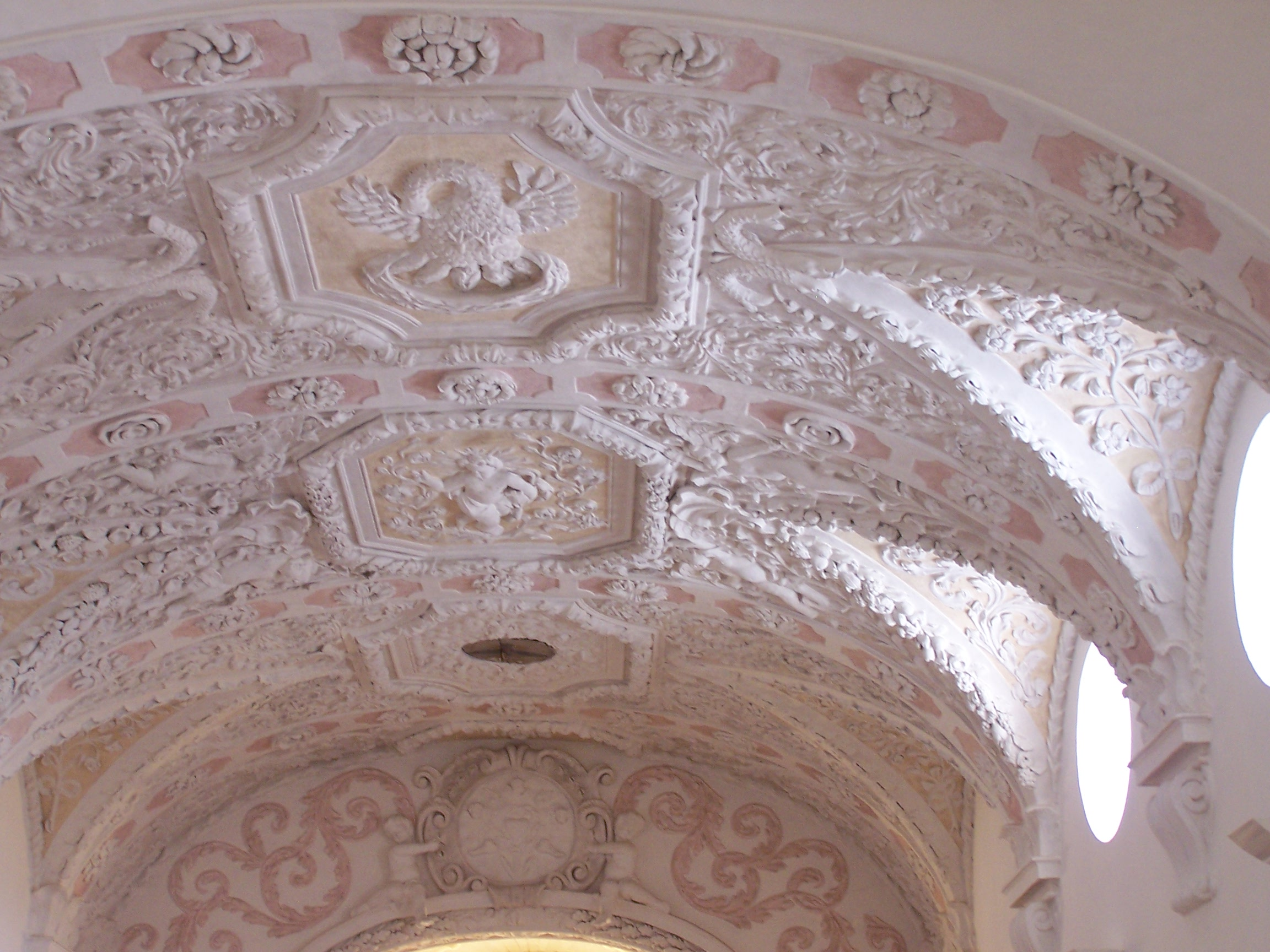 Wörth an der Isar. Landshuter Straße 55. Katholische Pfarrkirche St. Laurentius. Im barocken Schiff Stichkappentonne auf Gesimsstücken und Volutenkonsolen. Stukkaturen um 1680. Kassertiere Gurte, Rahmungen aus kräftigen Girlanden, Akanthusranken und Engelsfiguren.